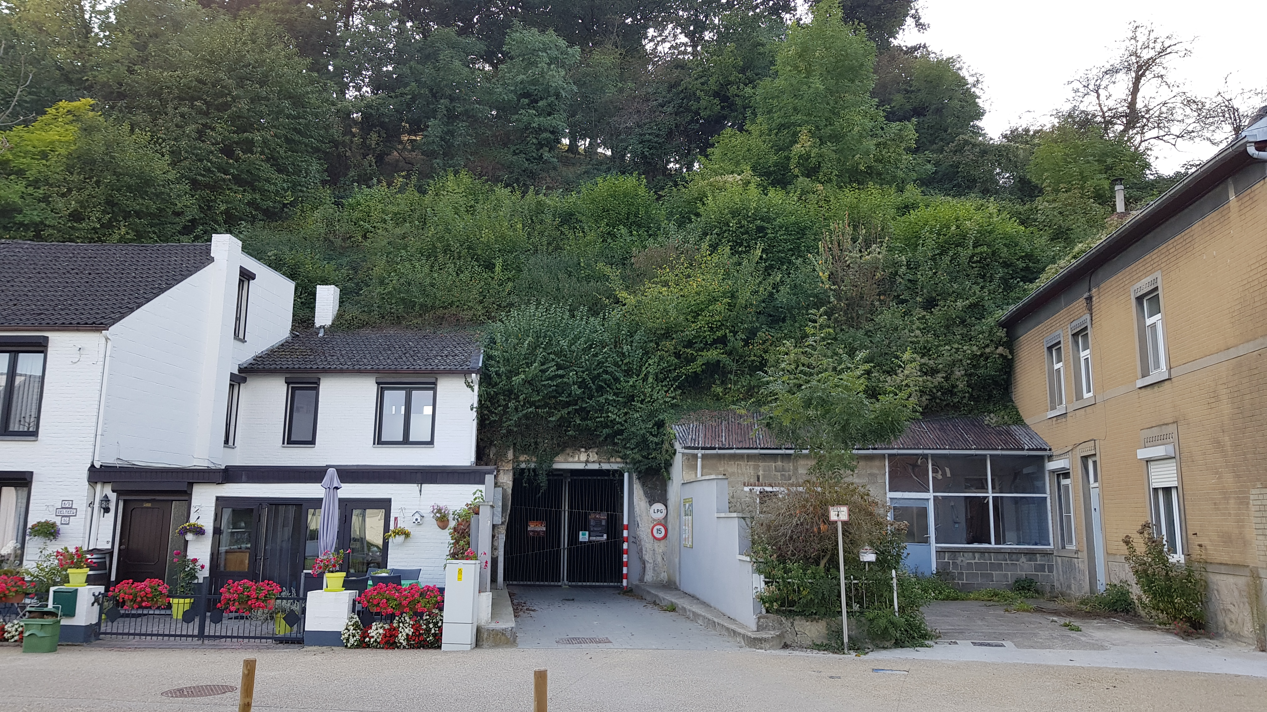 Mergelgroeve van Kanne, Kanne, Riemst, België